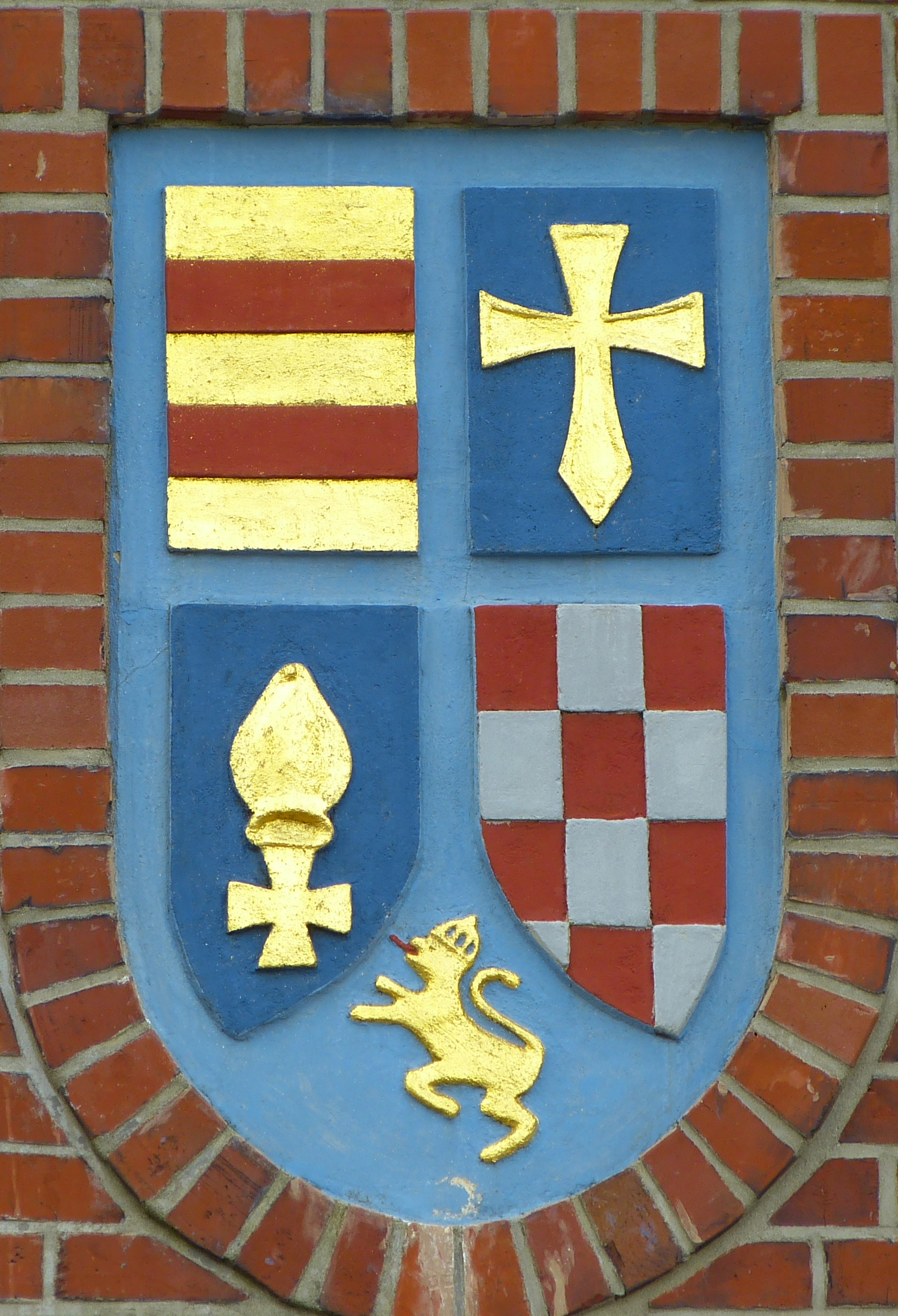 Tonnen- und Bakenamt zu Bremen, Wasser- und Schifffahrtsamt Bremerhaven in Bremerhaven, Am Alten Vorhafen 1; Giebelzier, Wappen OldenburgDer Tonnenschuppen ist ein geschütztes Kulturdenkmal in der Freien Hansestadt Bremen, mit der Nr. 1519 beim Landesamt für Denkmalpflege registriert.